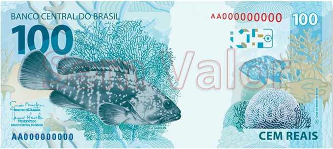 Verso da nova nota de 100 reais.